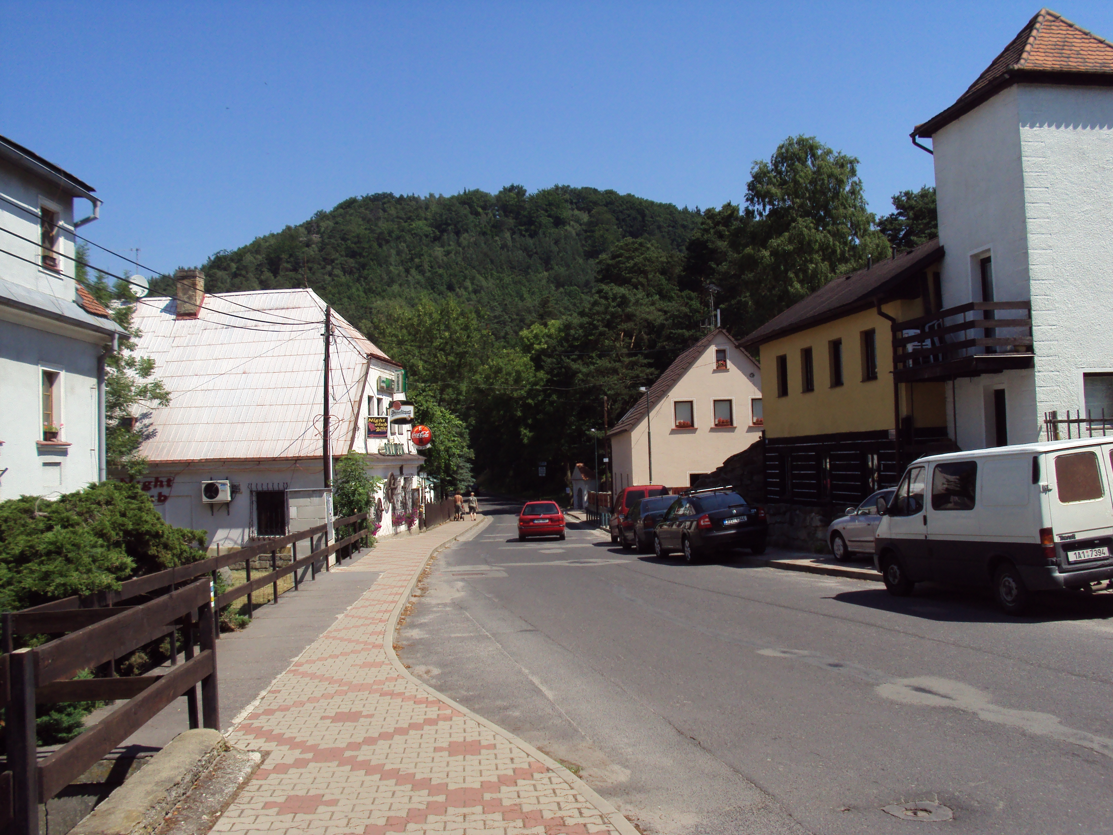 Vrch Šroubený od Starých Splavů, u Máchova jezera, Dokská pahorkatina